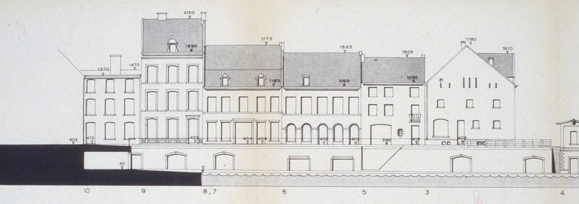 Bassin: tekening van de westelijke gevelwand (gesloopt ca. 1980).